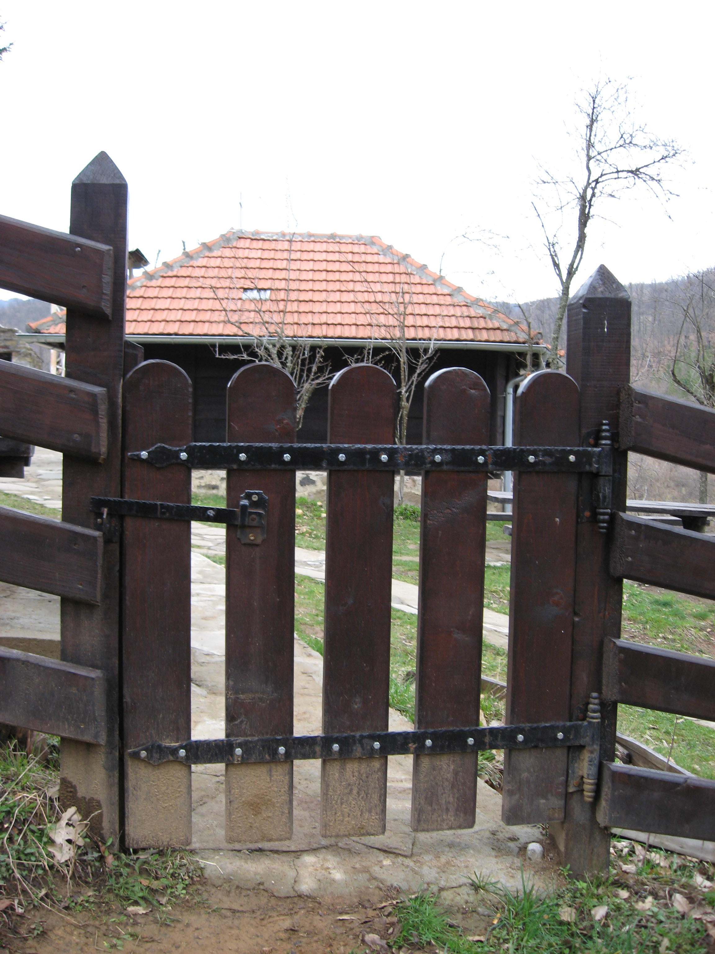 Капија на цркви Лазарица поред Пролом Бање. Драган Цветковић, Ниш